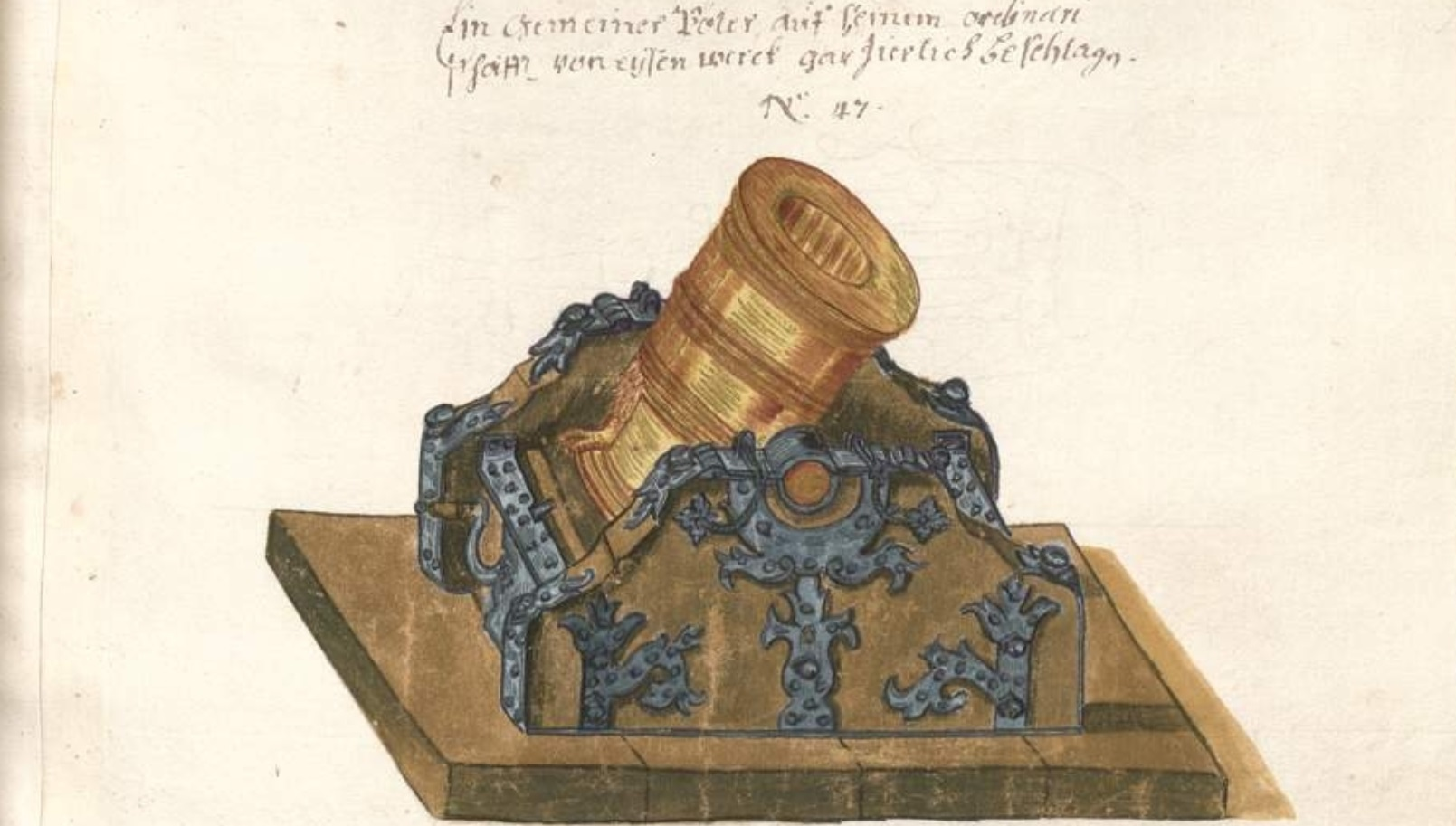 Mörser des 16. - 17. Jahrhundert